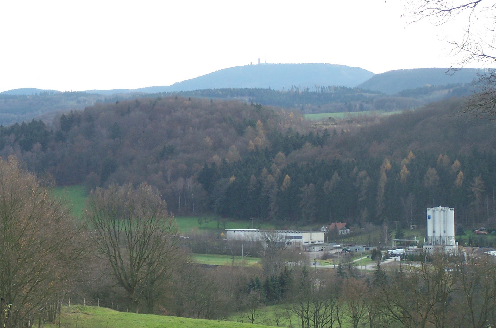 Blick zum ehemaligen Rehhof. Der große Vierseithof wurde erst in den 1990er-Jahren für den Bau eines Betonmischwerkes geopfert.